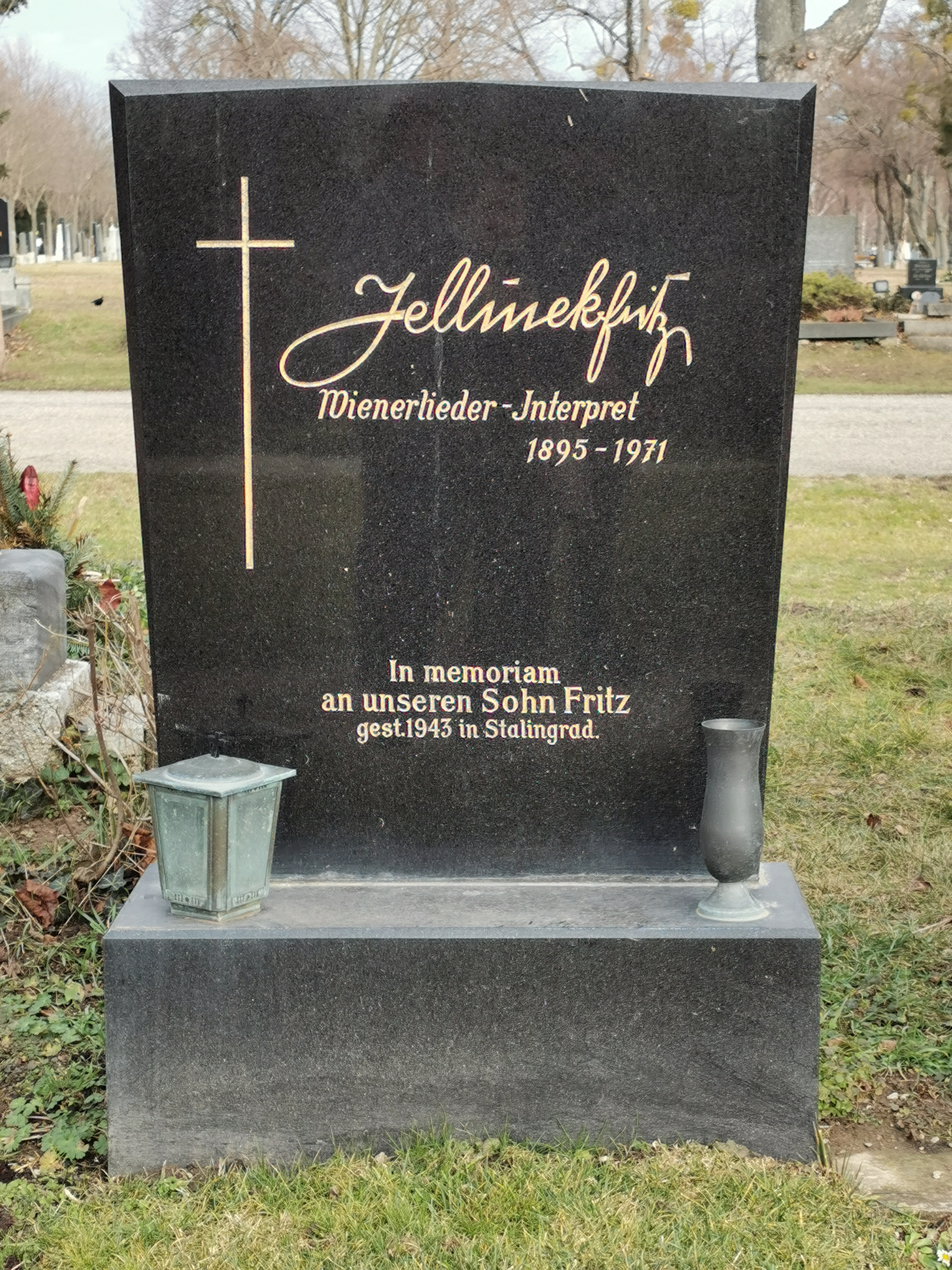 Grab von Fritz Jellinek (1895-1971) auf dem Wiener Zentralfriedhof